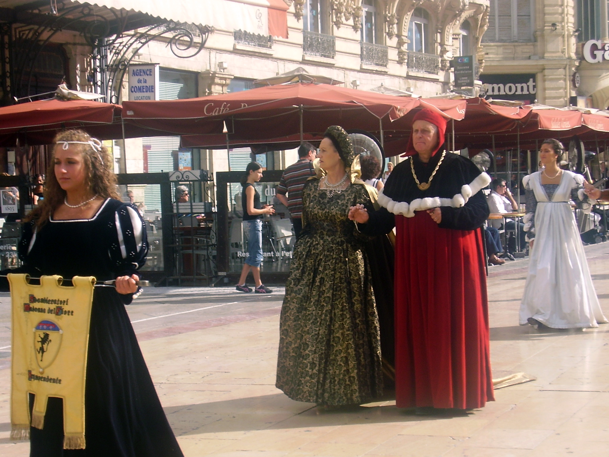 Procession lors de la Fête Saint Roch à Montpellier (Hérault, France).